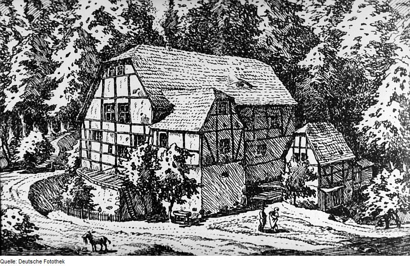 Original image description from the Deutsche Fotothek Wilsdruff-Blankenstein. Tännigtmühle Weistropp (Heimat des Reifmüllers in der Obermühle Blankenstein), aus: Unsere Heimat, 1937